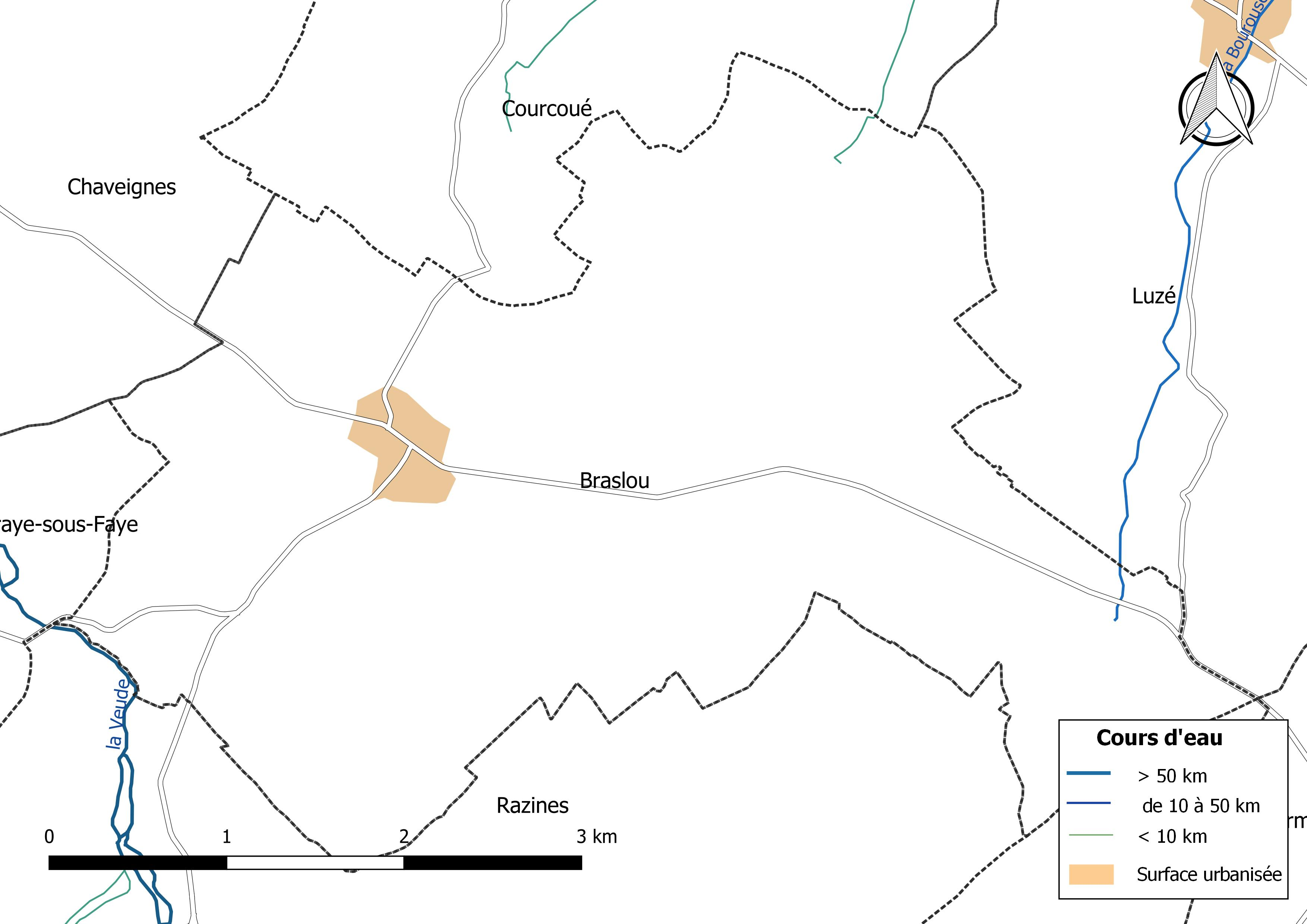 Carte du réseau hydrographique de la commune de Braslou (France).